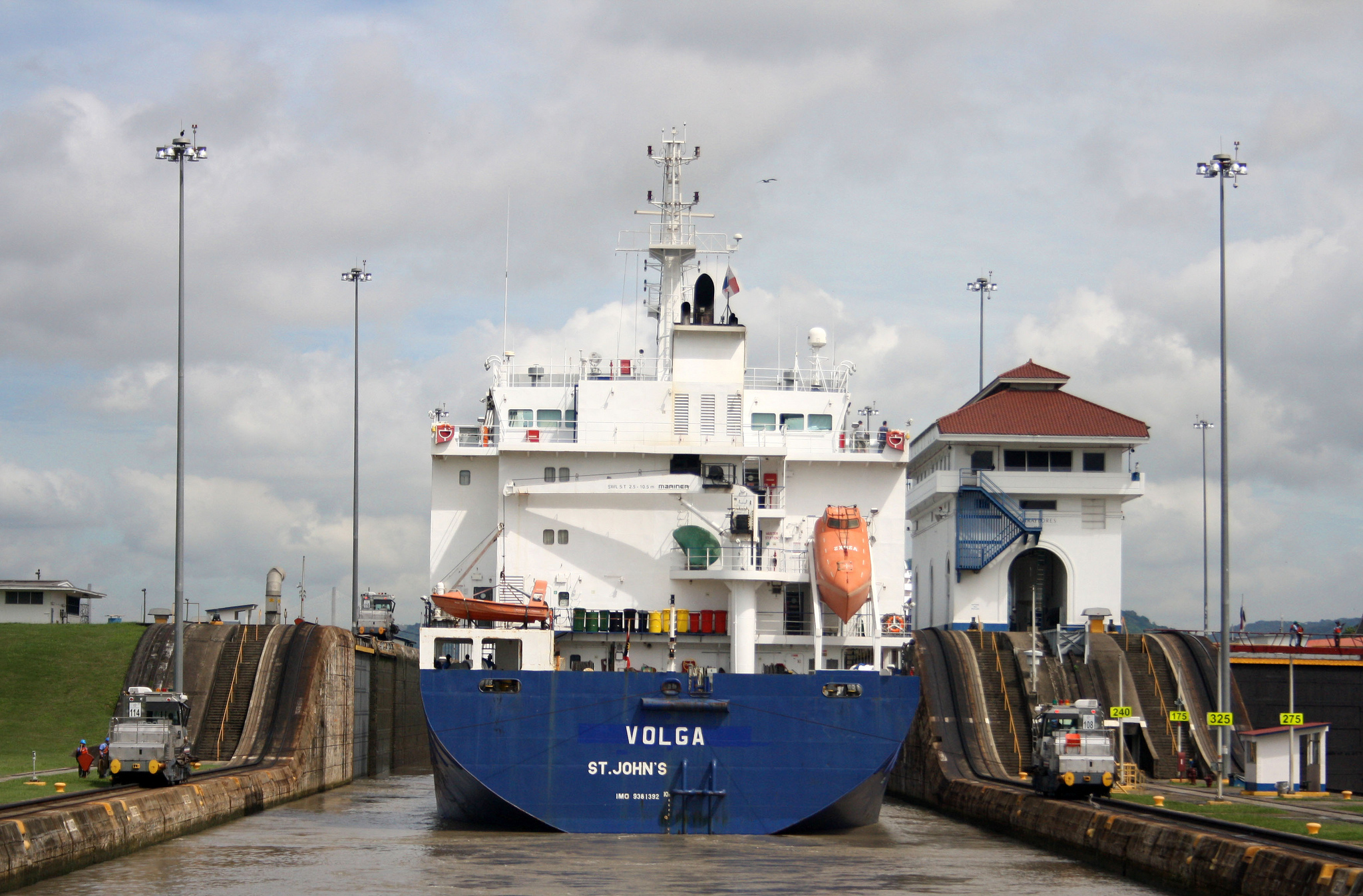 Barco pasando las esclusas de Miraflores